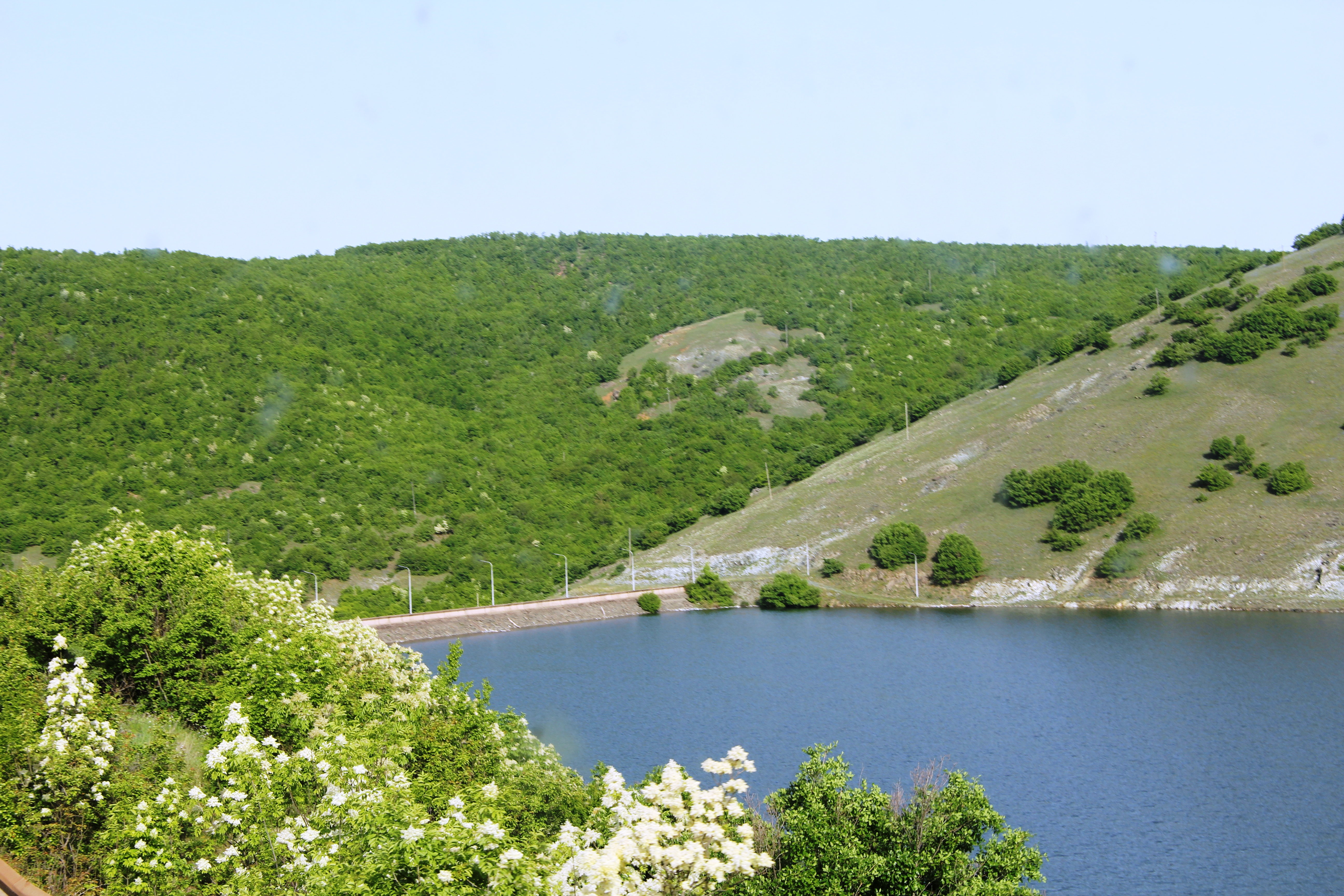 Liqeni akumulues i Badocit